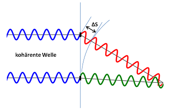 Illustration des Gangunterschieds